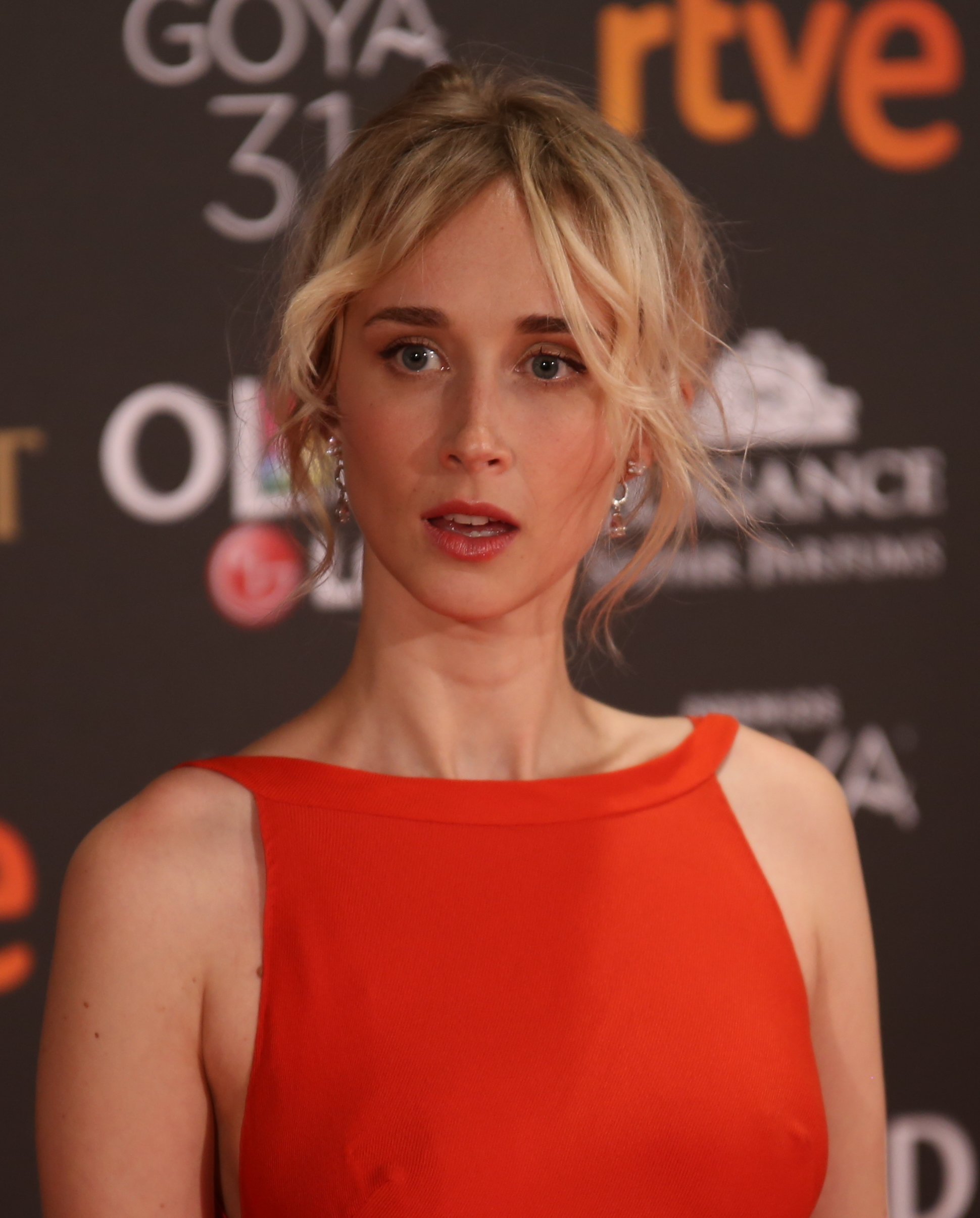 Premios Goya 2017